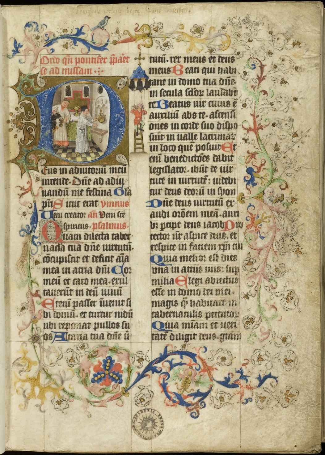 "Pontificale ecclesiae beatae Mariae Trajectensis" met de Meester van Katharina van Kleef als verluchter. Bisschop en de voorbereiding van de mis in initiaal weergegeven